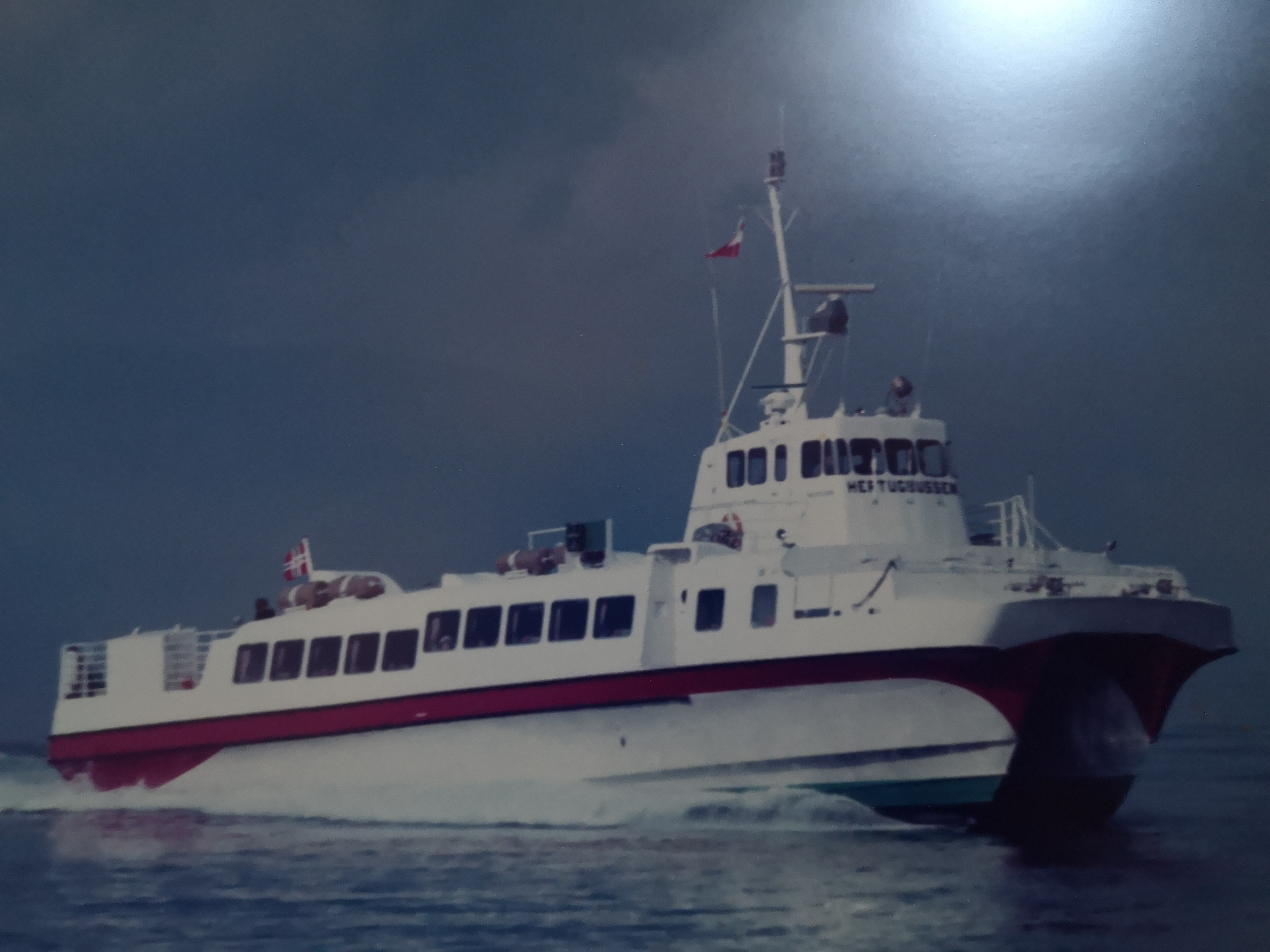 Hurtigbåt av klassen Westamaran bygget hos Westmoen